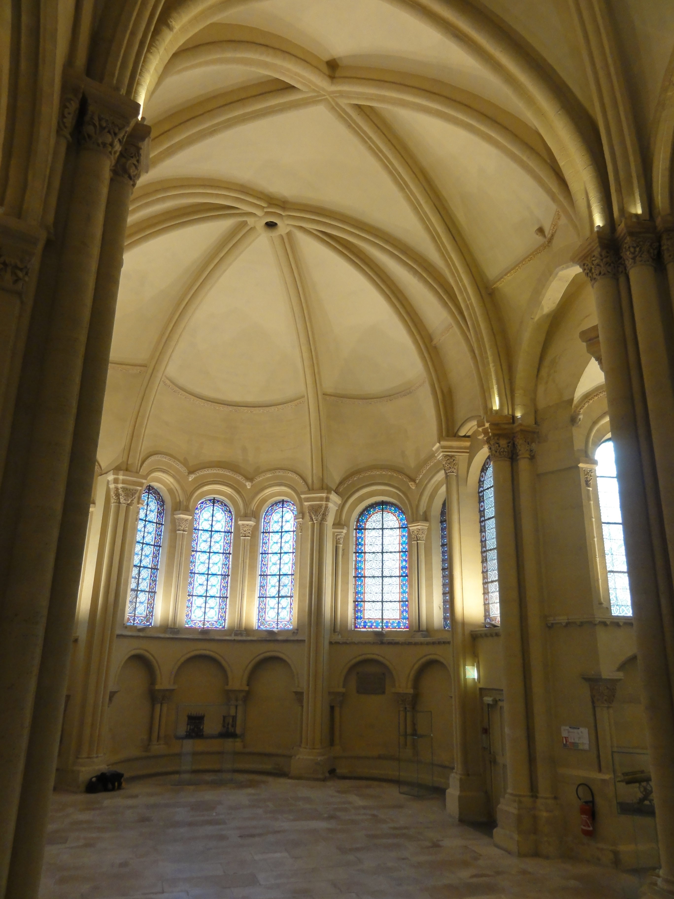 Chapelle d'axe.